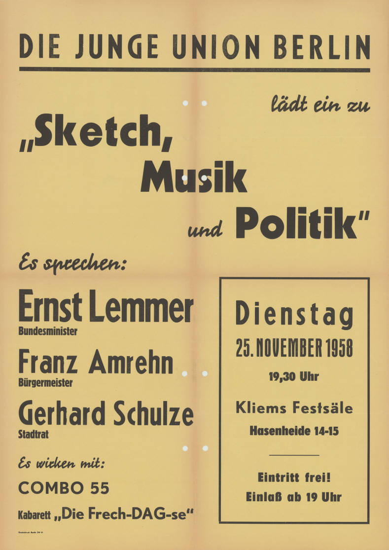 Die Junge Union Berlin lädt ein zu "Sketch, Musik und Politik" Es sprechen: Ernst Lemmer Bundesminister Franz Amrehn Bürgermeister Gerhard Schulze Stadtrat Es wirken mit: Combo 55 Kabarett "Die Frech-DAG-se" ...Plakatart:AnkündigungsplakatAuftraggeber:JU BerlinDrucker_Druckart_Druckort:Goebeldruck, Berlin SW 61Objekt-Signatur:10-028 : 395Bestand:Plakate von Jugendorganisationen der Parteien ( 10-028)GliederungBestand10-18:Plakate von Jugendorganisationen der Parteien (10-028) » CDU » Veranstaltungsplakate A - ZLizenz:KAS/ACDP 10-028 : 395 CC-BY-SA 3.0 DE